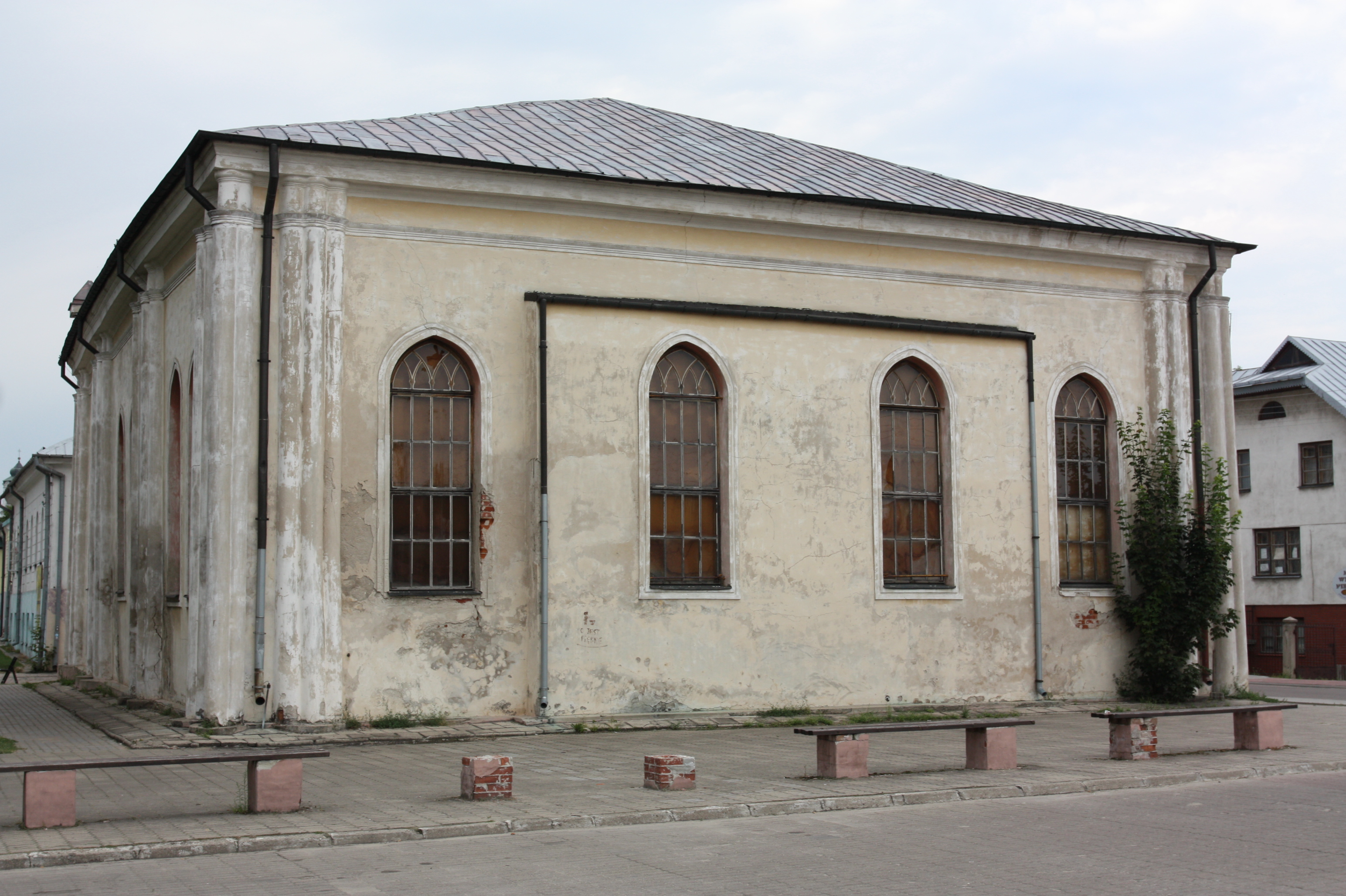 Ściana wschodnia białej synagogi w Sejnach